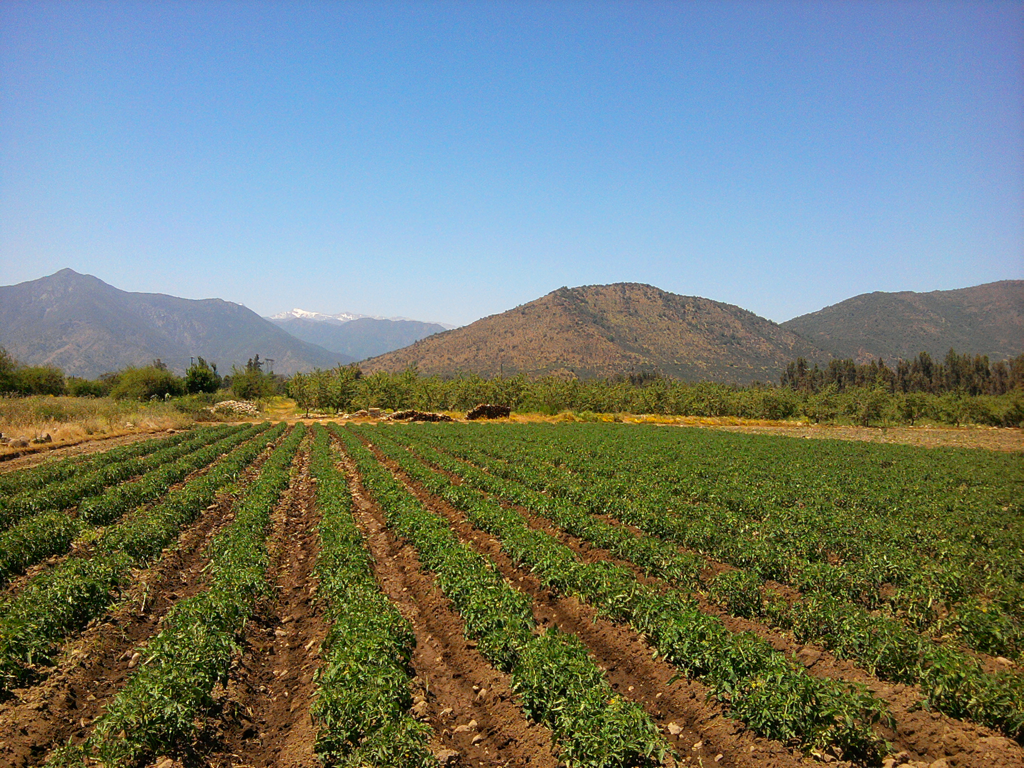 Cultivos de tomate en Los Césares, Rengo